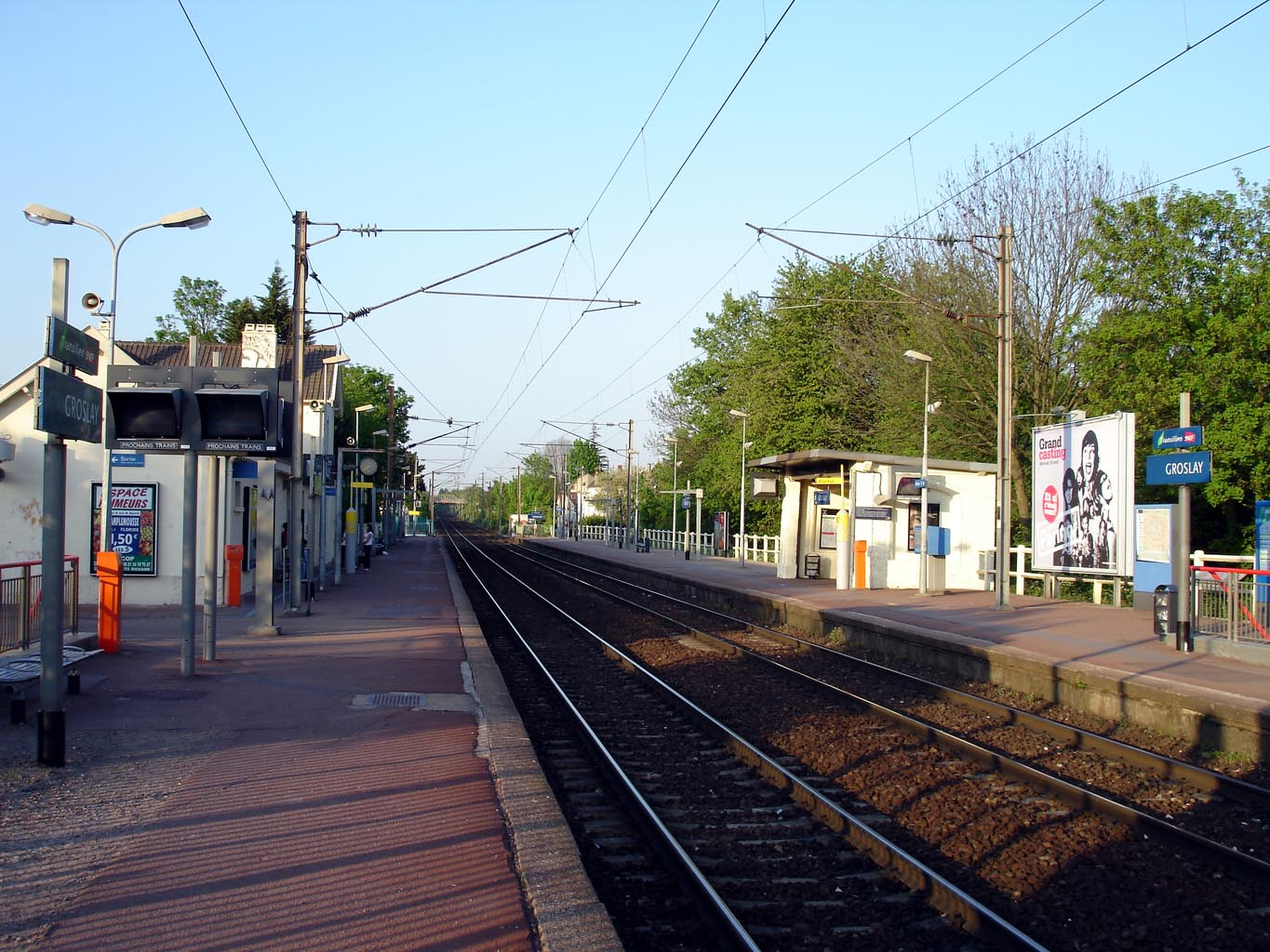 Gare de Groslay à Groslay (Val-d'Oise), France